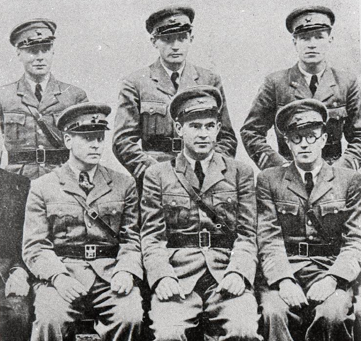 Члены Главного штаба эстонской организации "Народная Самозащита" ("Rahva Omakaitse"), 1940 год (L. Klaaser, K. Hansson, V. Feigin, I. Paul, A. Pirson ja A. Brenner)